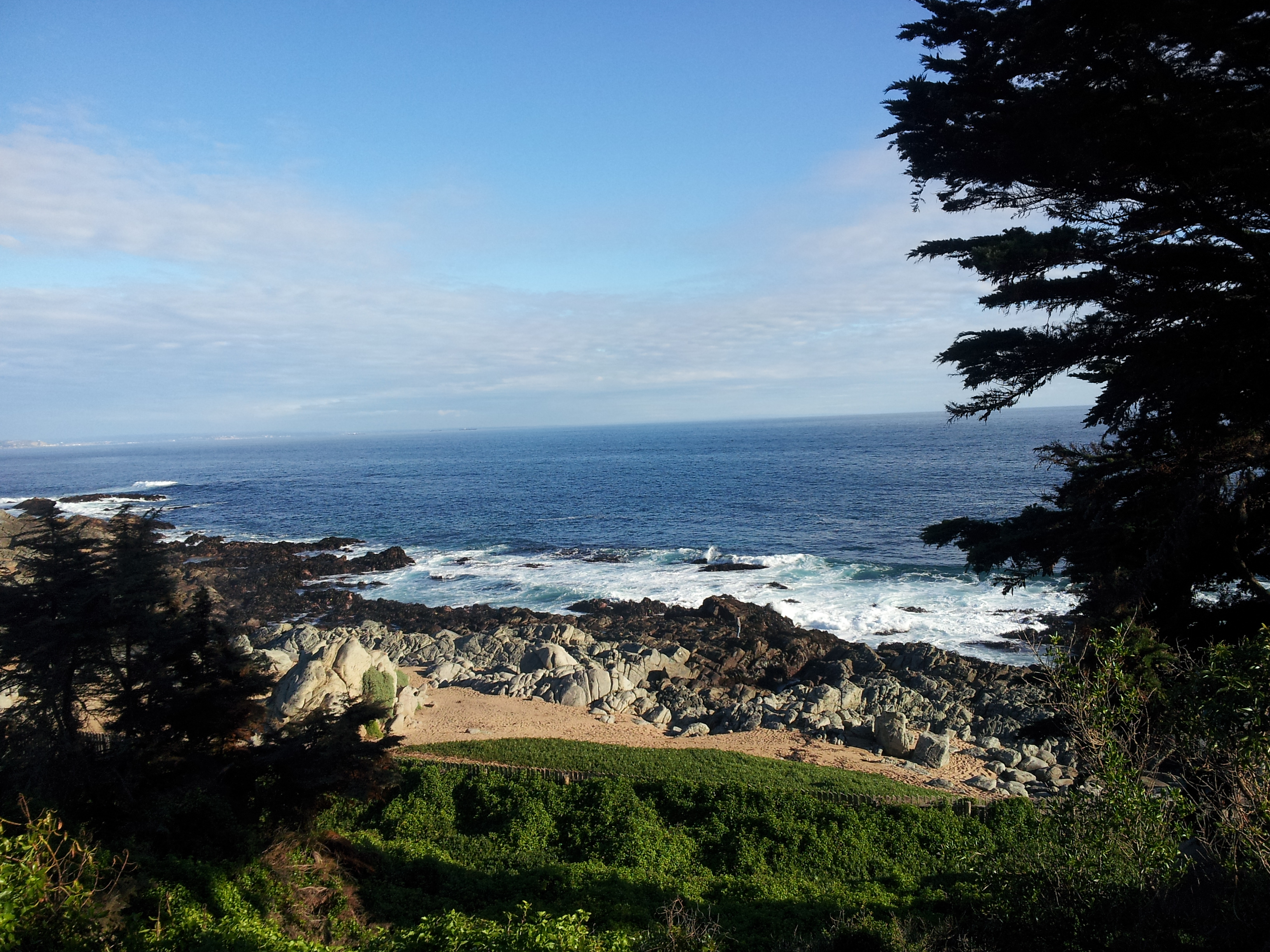 Desde la casa de Neruda, Isla Negra.